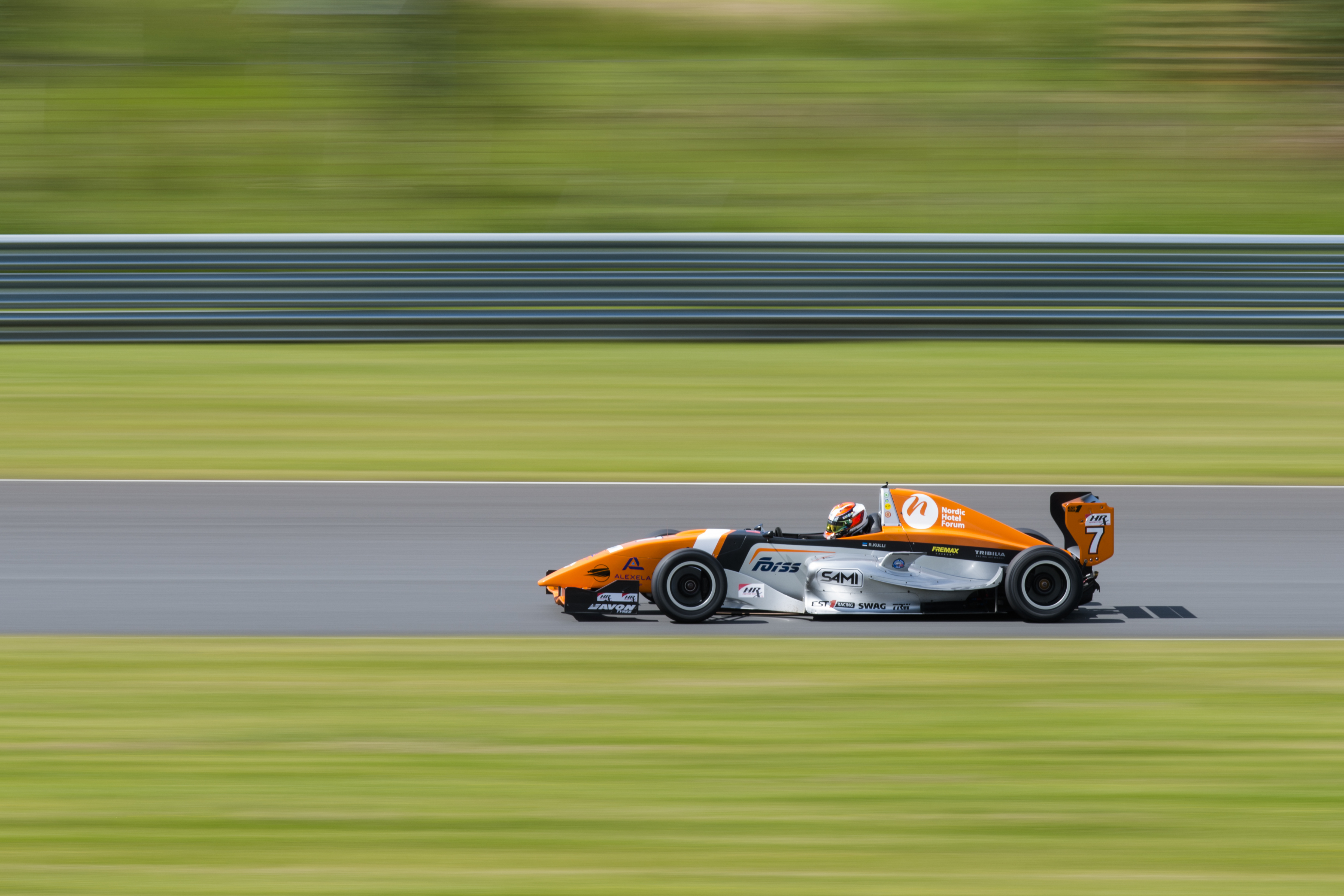 Pilt:Jaanus Ree